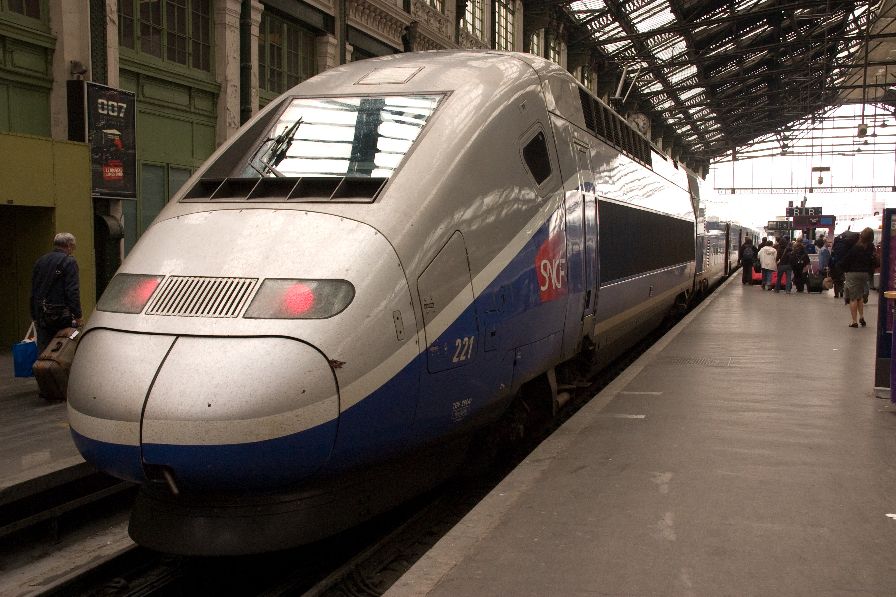 Gare de Lyon, Paris, France